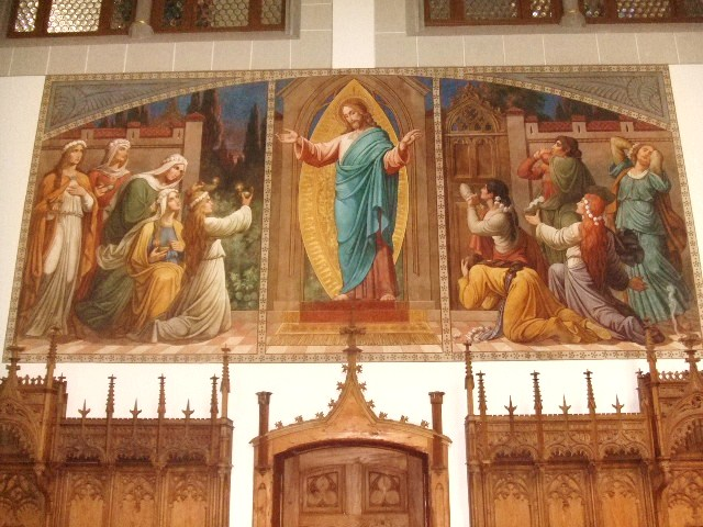 Kloster Untermarchtal, Untermarchtal, Alb-Donau-Kreis, Baden-Württemberg Rosenkranzkapelle, Wandgemälde im Nazarenerstil